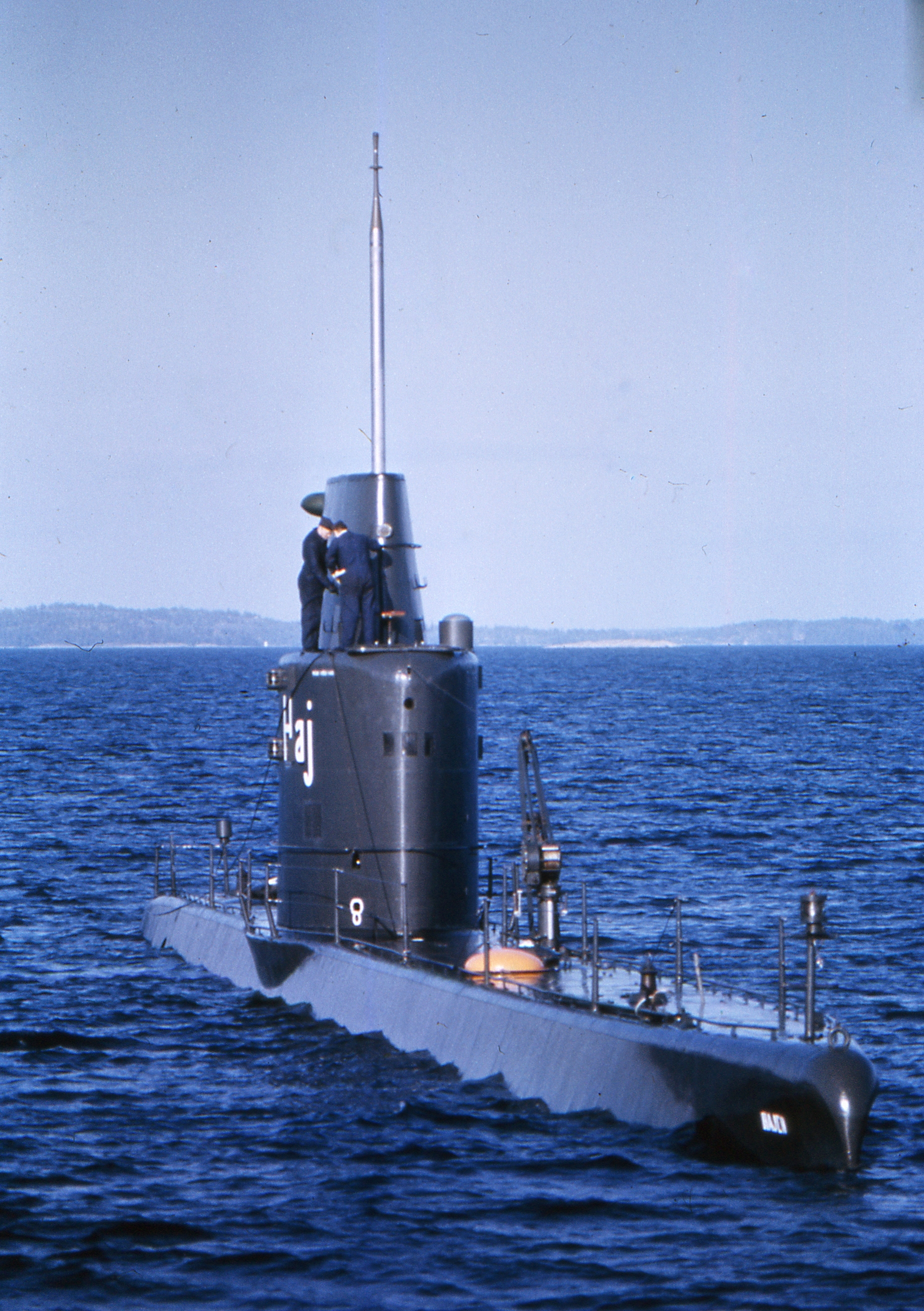 Den svenska ubåten HMS Hajen, byggd 1954.